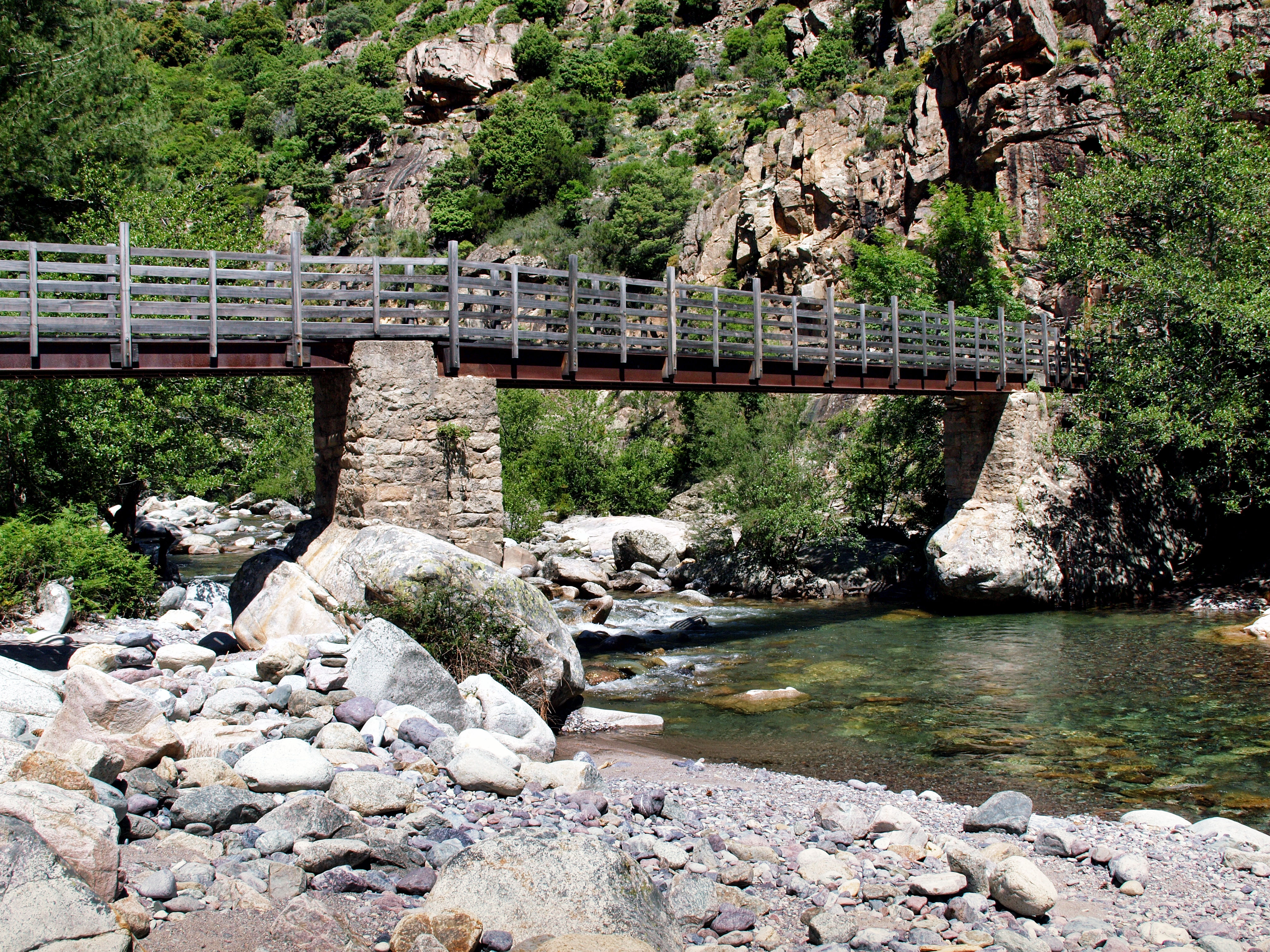 Asco, Vallée d'Asco (Corse) - Passerelle sur la rivière Asco donnant accès au parc de loisirs "Asco Vallée Aventure"